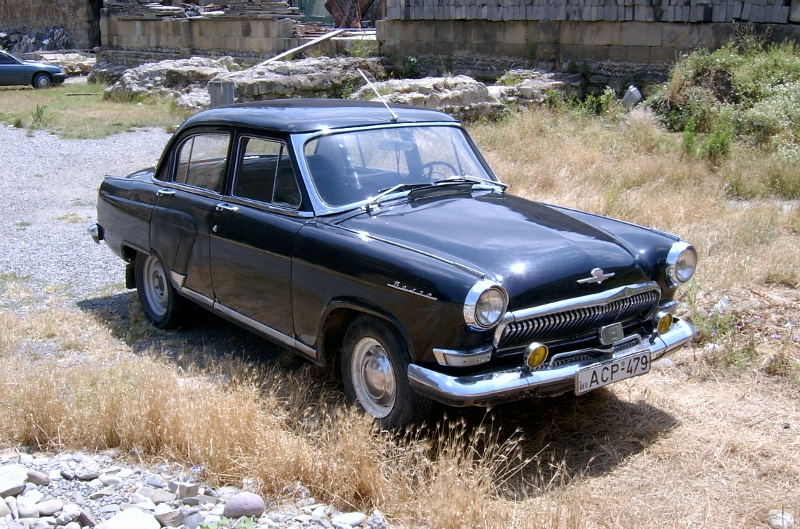 GAZ Wolga 21 (russ. Automarke)